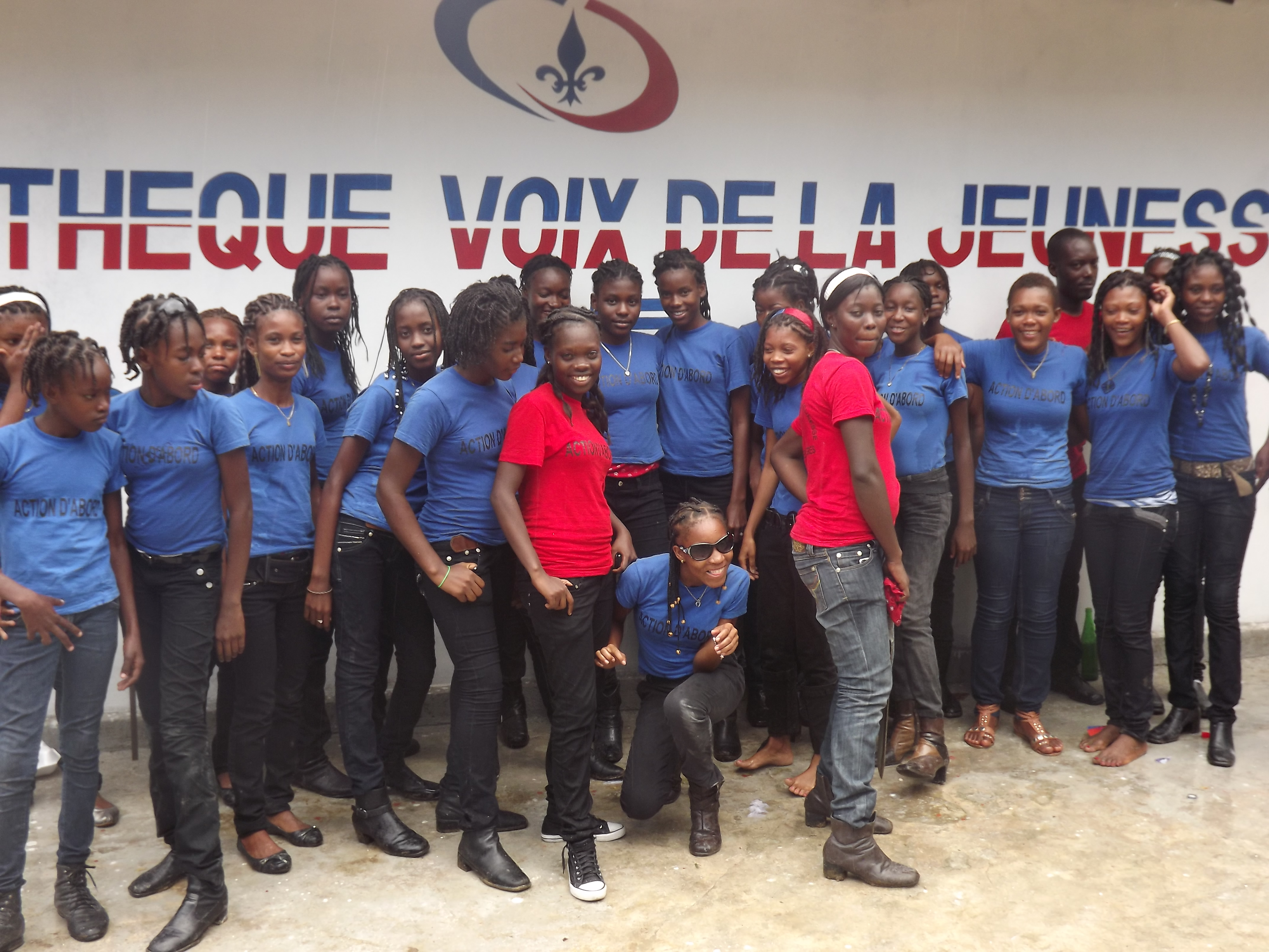 Photo de l'entree de la bibliotheque voix de la jeunesse de fond des negres qui se trouve dans la zone de pont roche, 3eme section communale pemerle